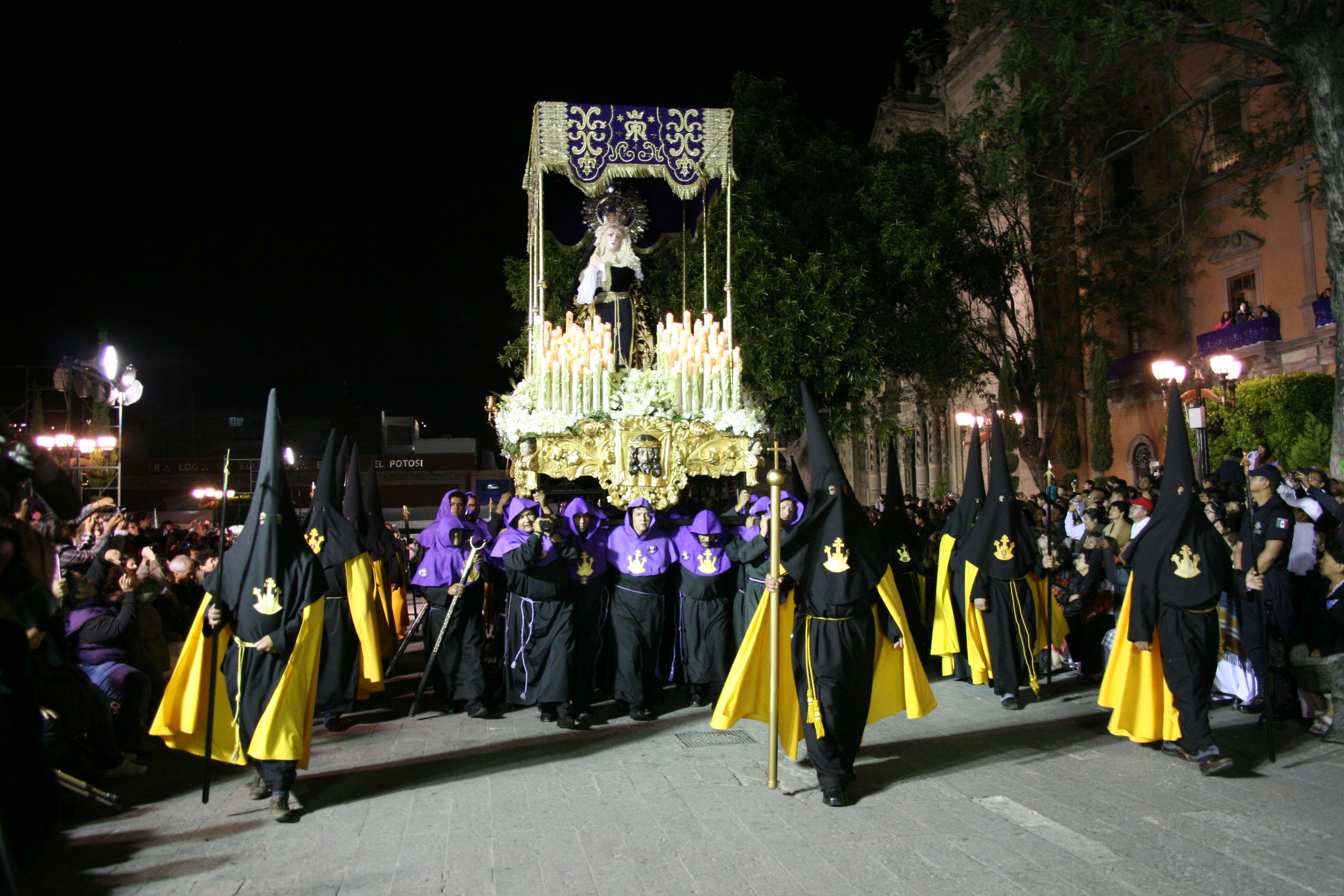 Nuestra Señora de la Soledad representada por la Cofradía de la Soledad en San Luis Potosí México